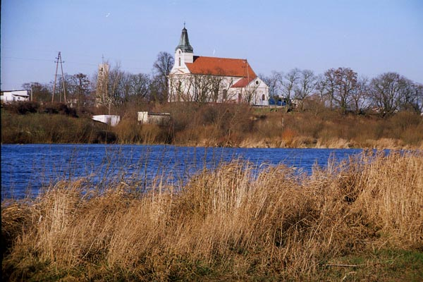 Wyszków – widok na Bug i kościół pw. św. Idziego.